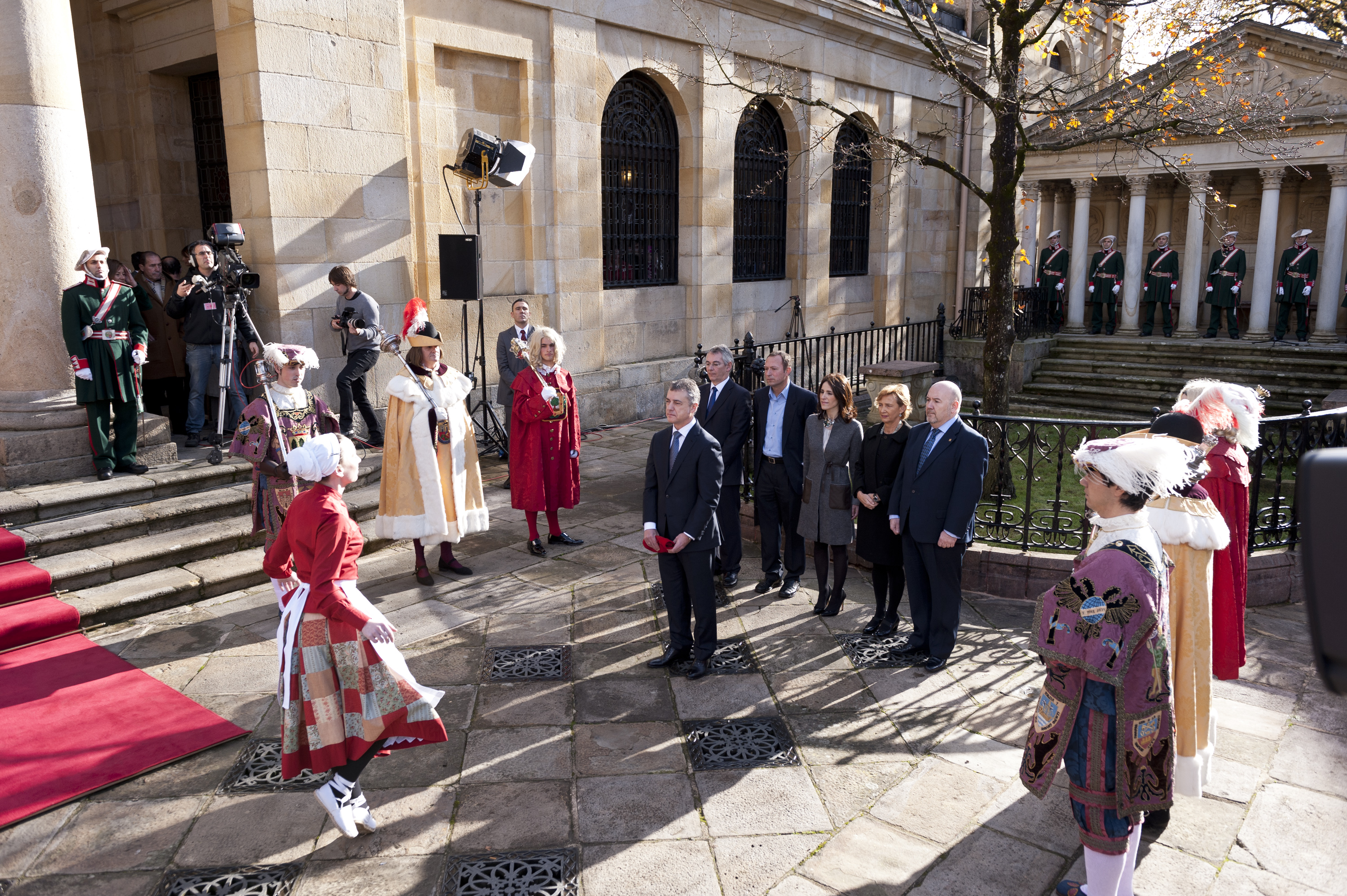 El lehendakari Iñigo Urkullu jura su cargo ante el árbol de Guernica